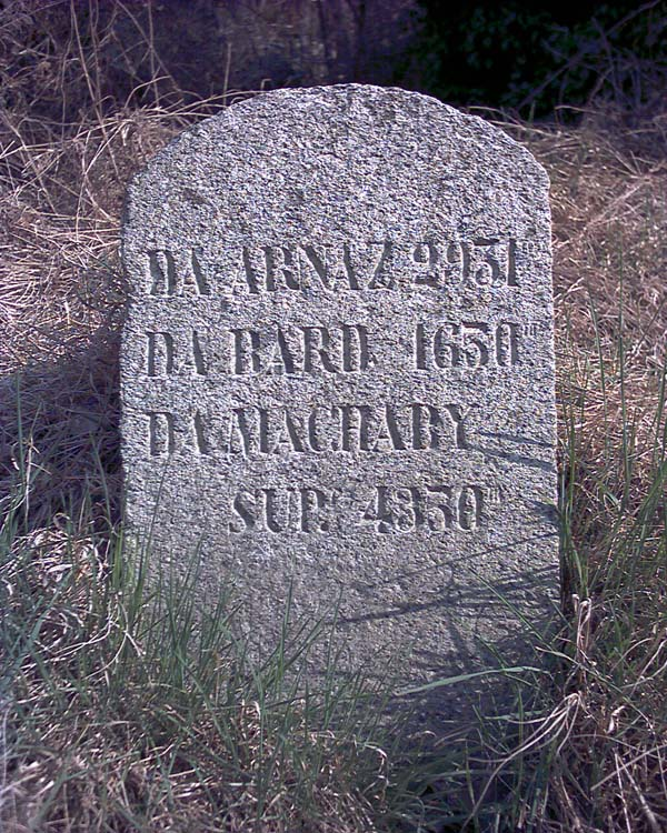 Cippo lungo la strada militare Machaby.Forte di Machaby, Arnad, Valle d'Aosta, Italia.